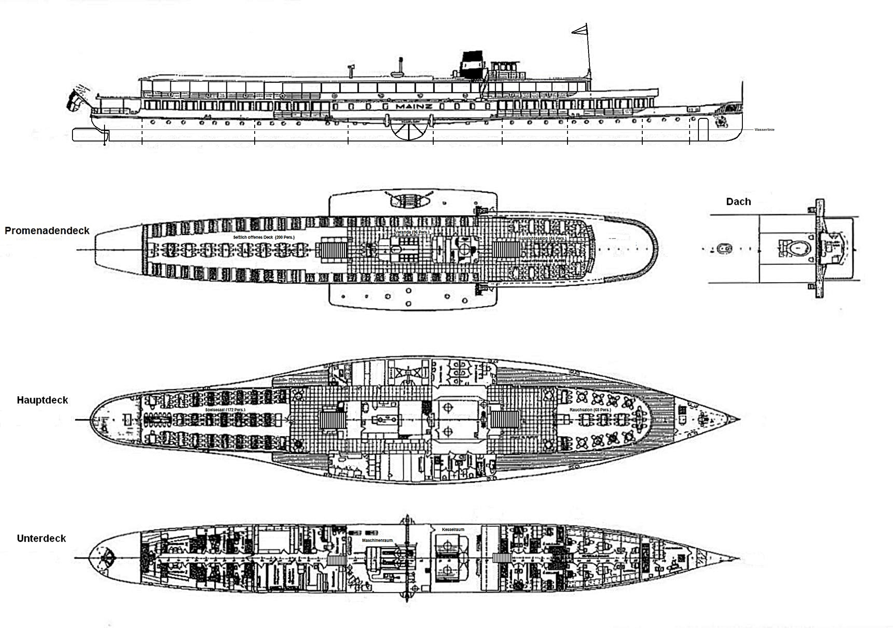 Deckplan des Raddamfer Mainz